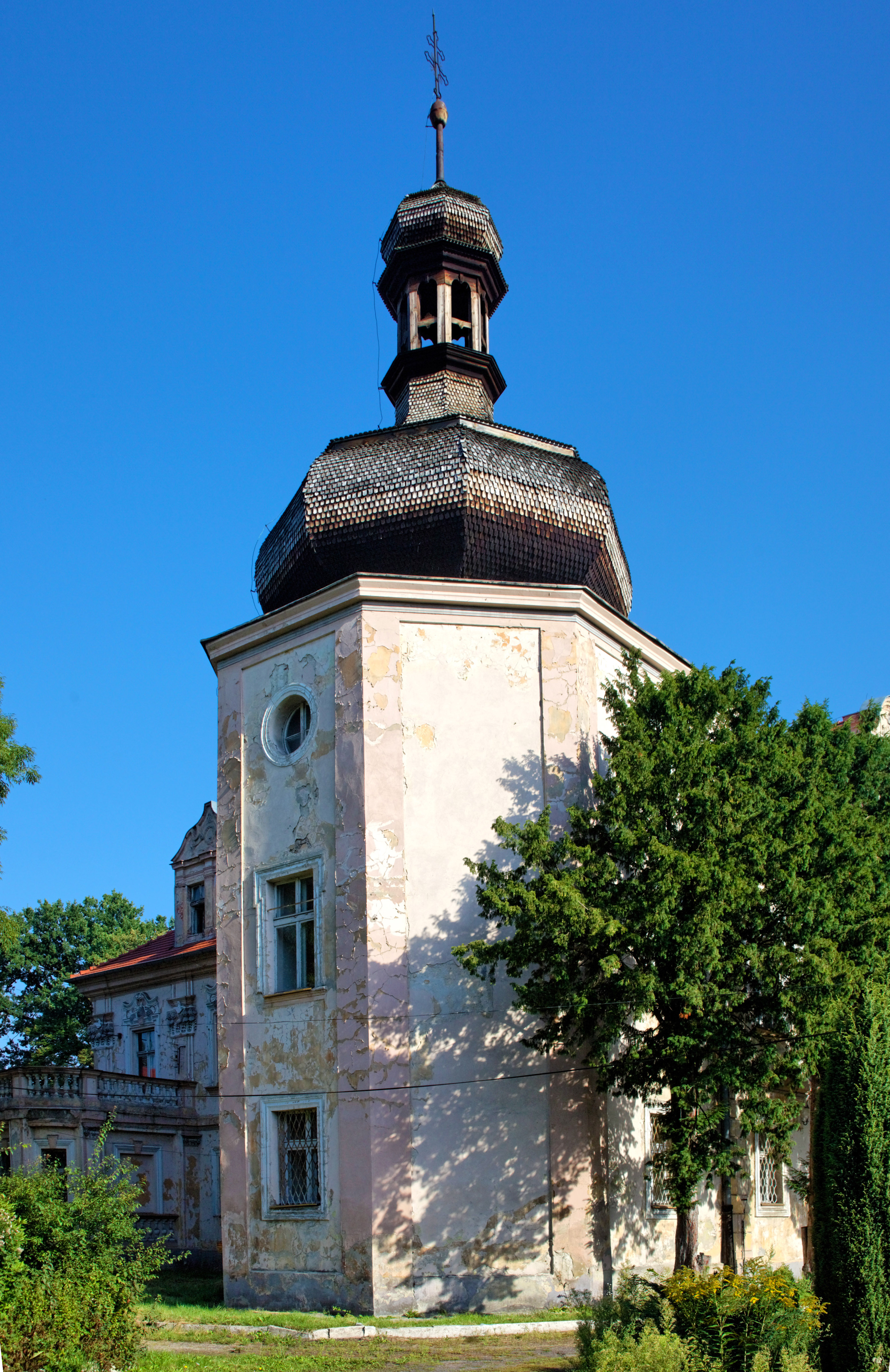 Turawa, ul. Opolska 40 - pałac, mur., 1728, 1751, 1760, 3 ćw XIX w., obecnie Dom Dziecka (zabytek nr 194/56 z 12.04.1956)